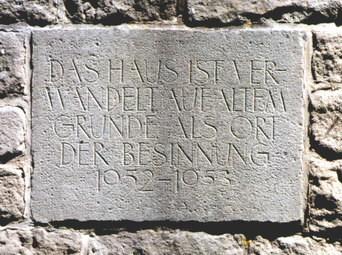 Burg Fürsteneck - Gündungsinschrift als Bildungeinrichtung.